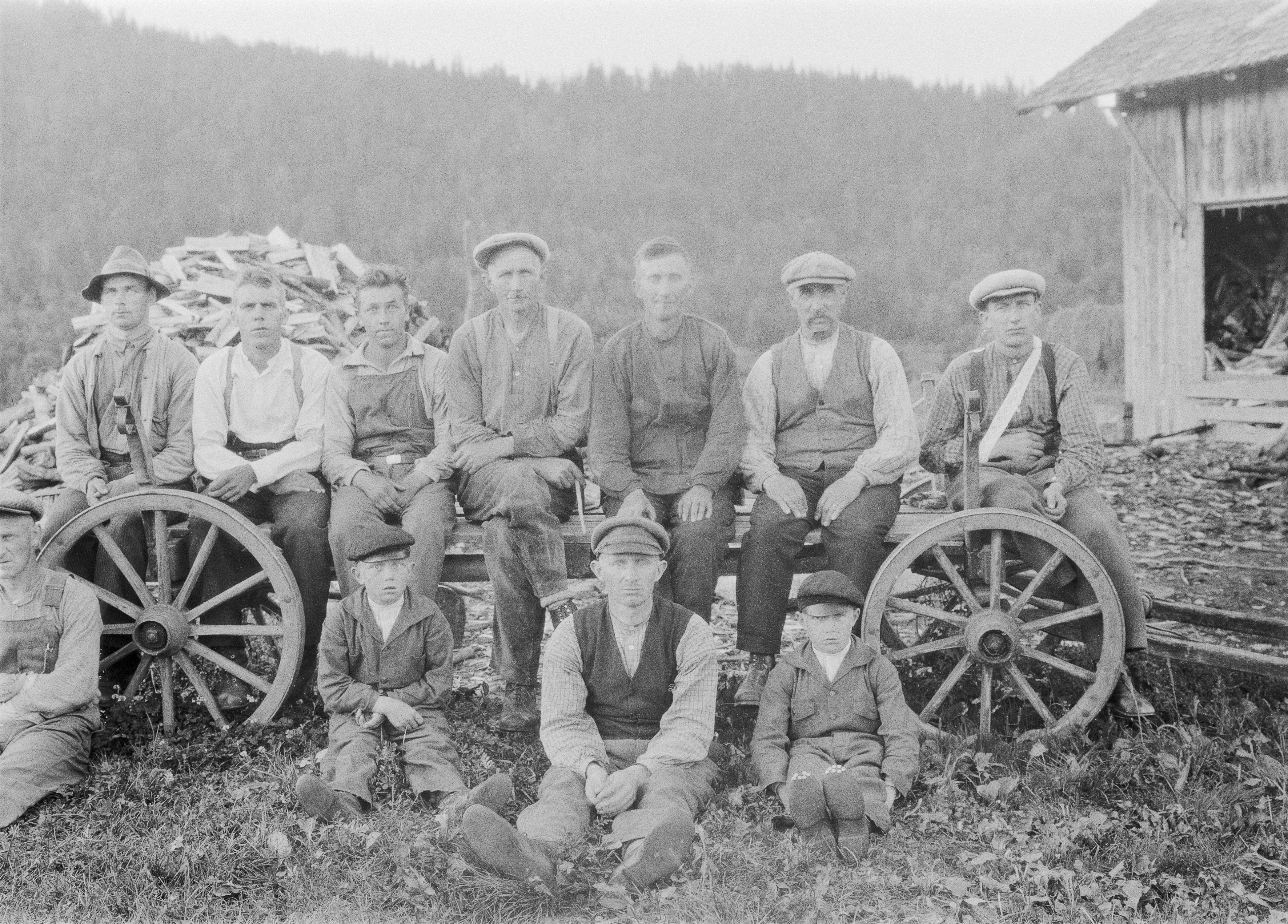 Metsäsuomalaisia heinänkorjuumiehiä kuvattuna vuonna 1931. Kuvan ottopaikka Purala, Röjdåfors, Östmark, Värmland, Ruotsi.